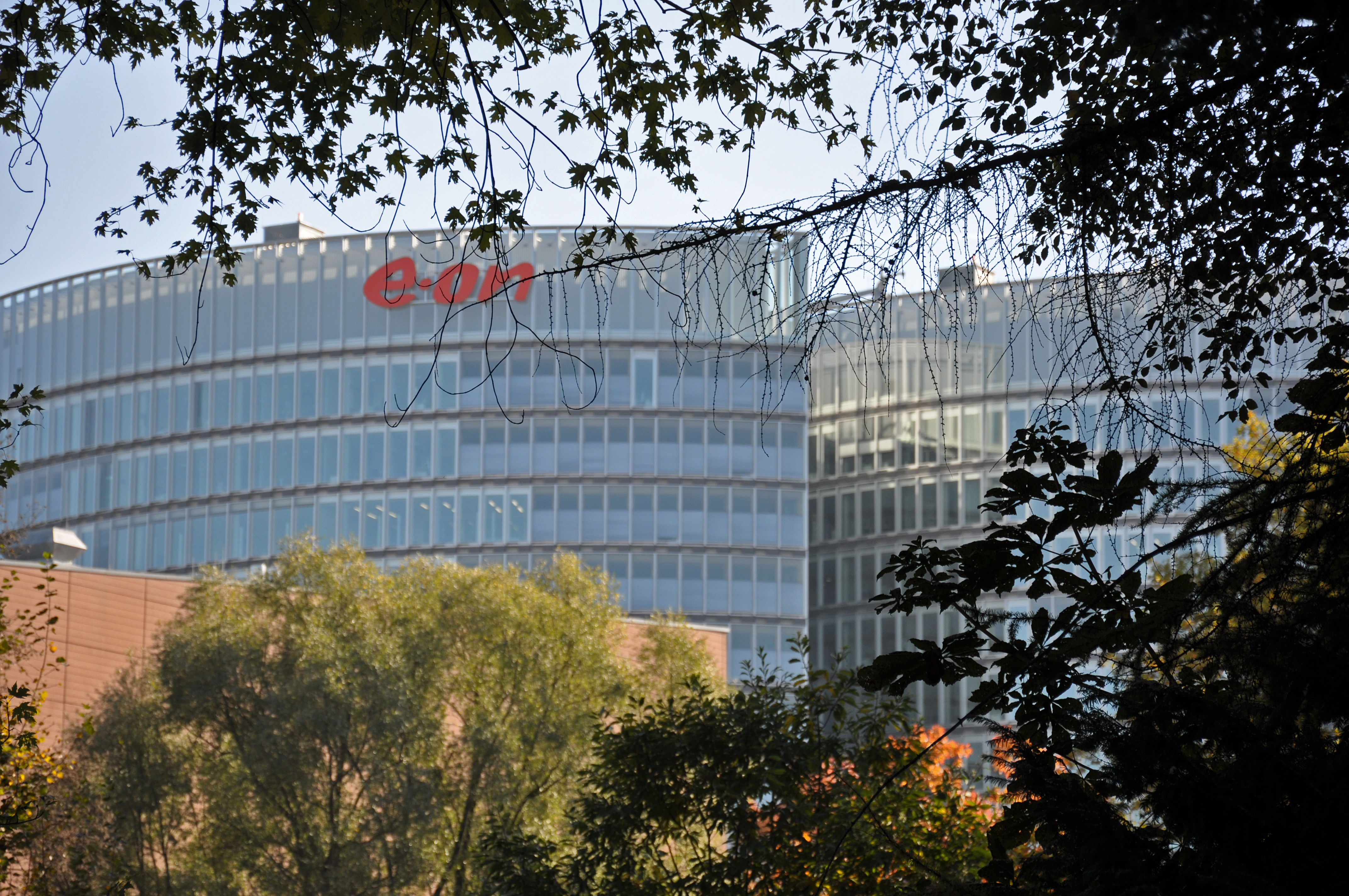 Neubau der Hauptverwaltung E.on-Ruhrgas in Essen. Sicht von der Gruga